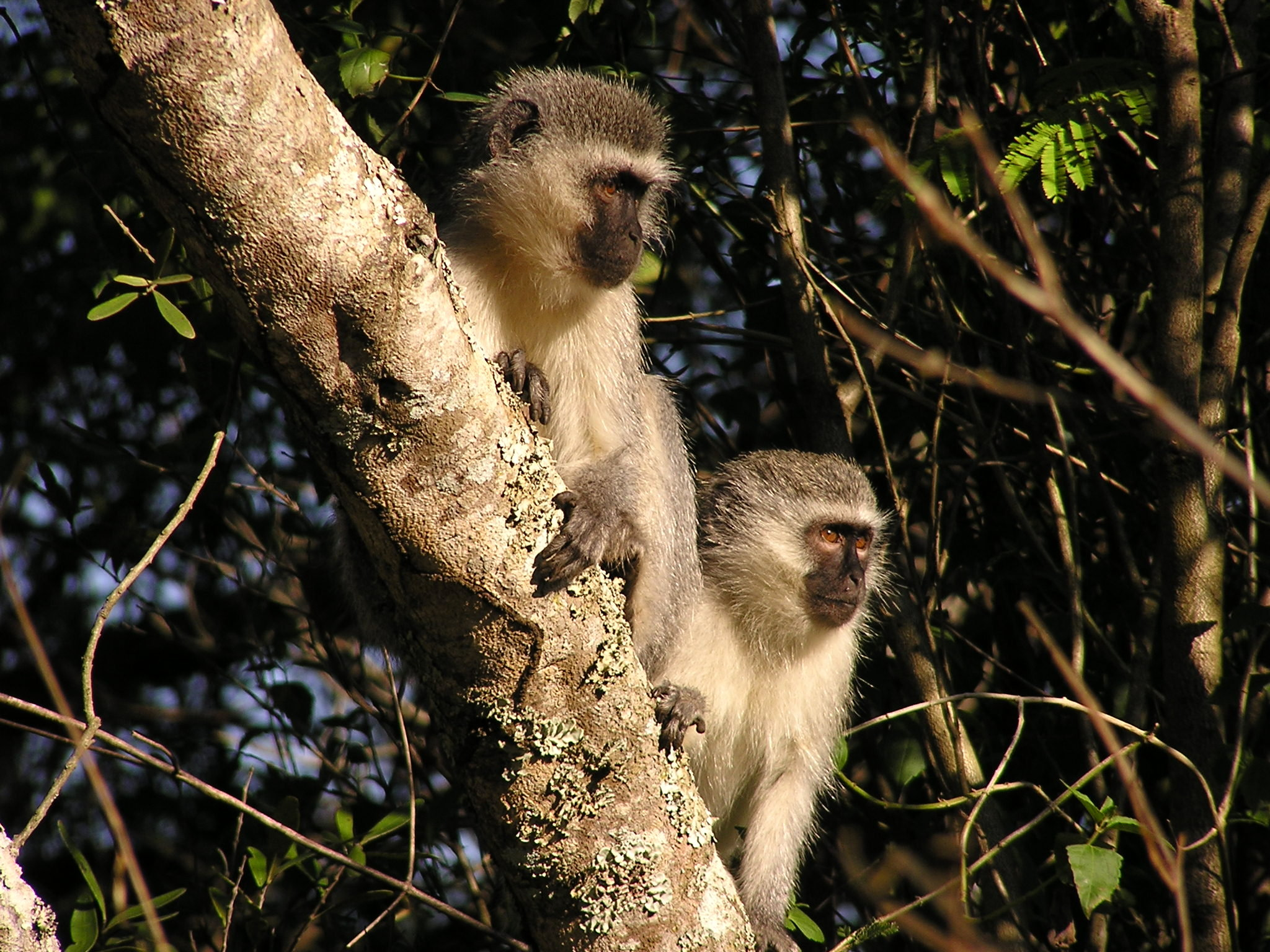 Südliche Grüne Meerkatze, Hluhluwe/Umfoloui Nationalparl, Südafrika